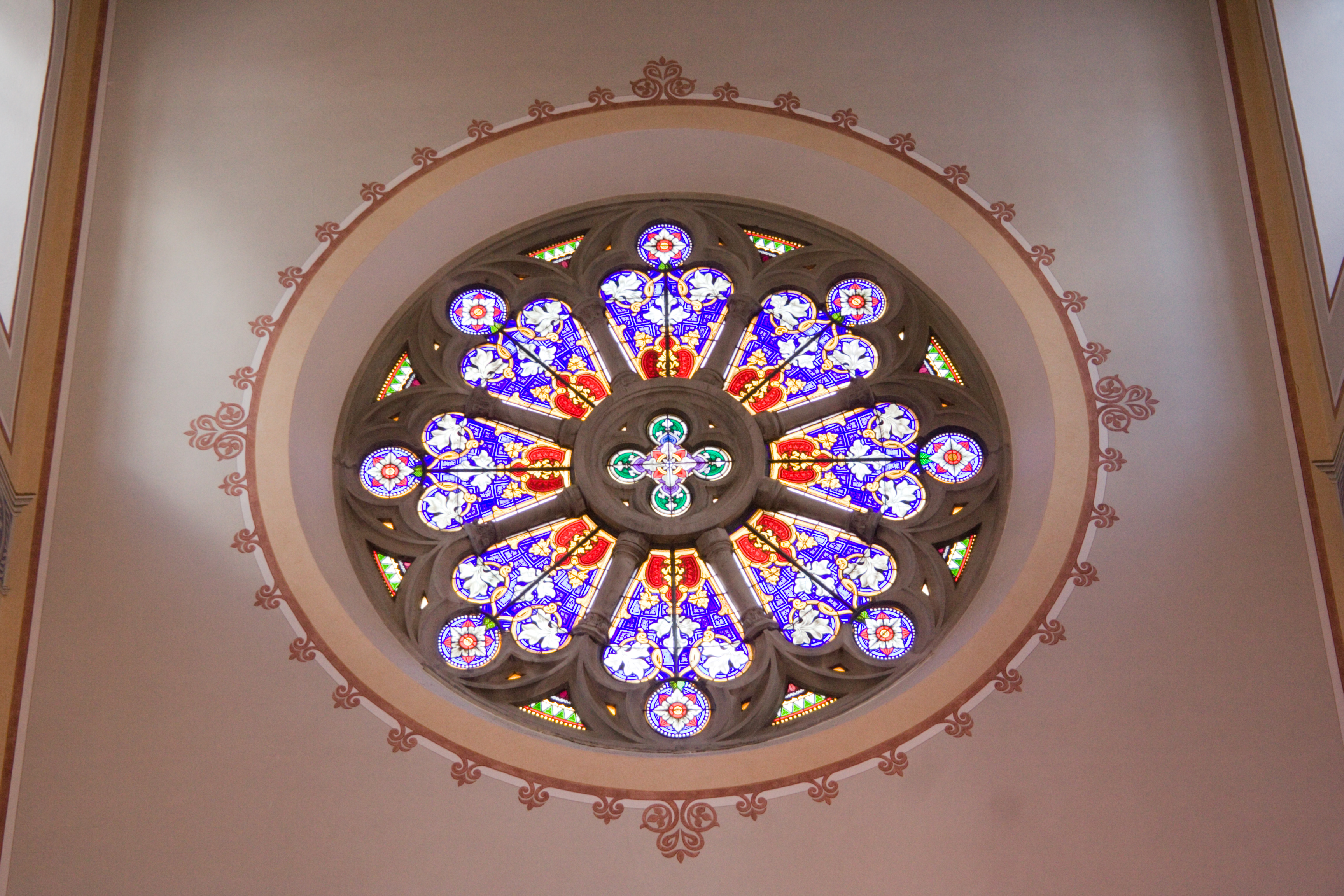 Die kreisförmigen Fenster der Stadtkirche Glarus, Schweiz